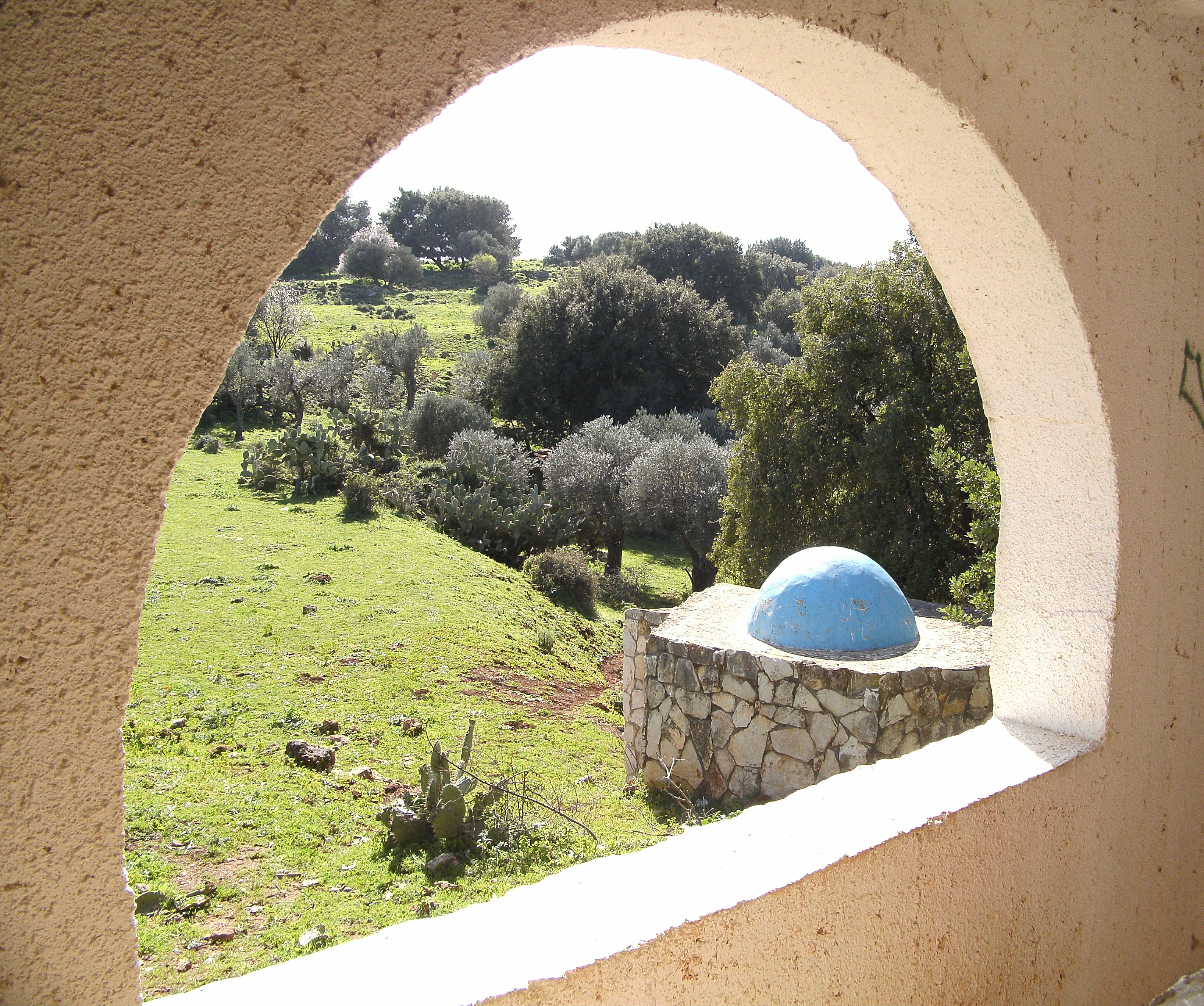 התנא רבי ישמעאל בעל הברייתות